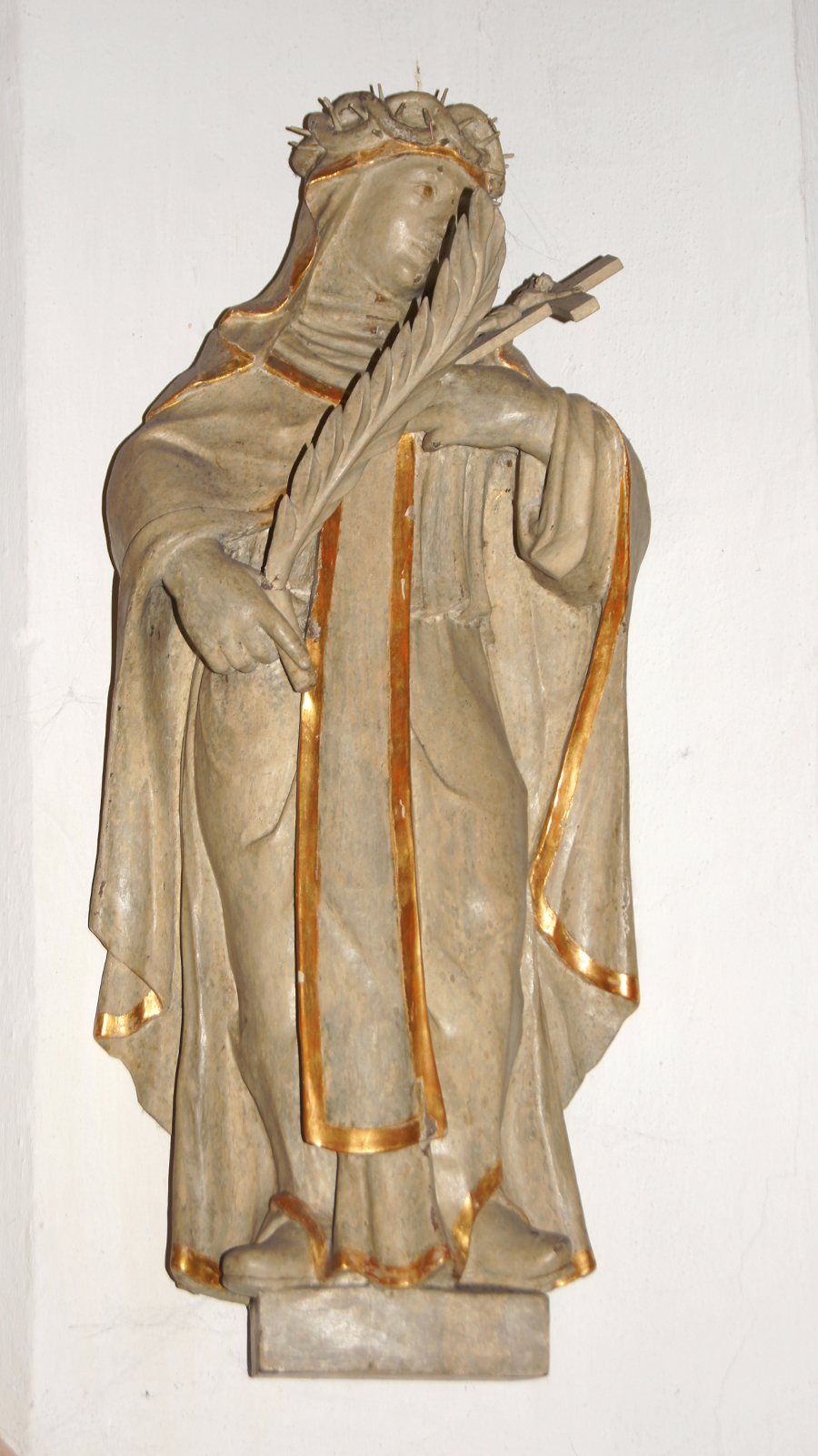 Hölzerne Statue der Hl. Katharina von Siena (1347 - 1380) mit Dornenkrone, Palme und Kreuz in der Klosterkirche St. Marien Burlo, Stadt Borken (NRW). Die Entstehung der Figur wird auf das Ende des 17. / Anfang des 18. Jahrhunderts datiert.This is a photograph of an architectural monument. A1 - A 26